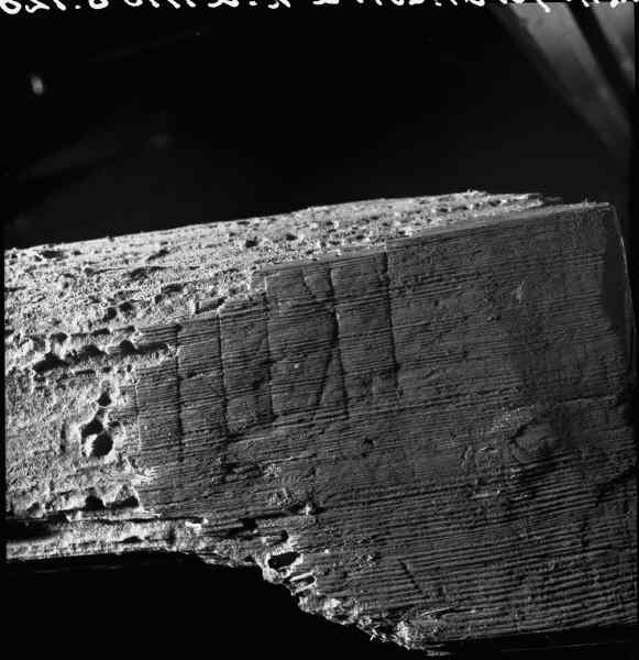 Medeltida stockar med runinskrift på vissa, från gamla kyrkan, funna under restaurering 1910. Detalj. Kategori: (02) Interiörer, detaljerMedeltida stockar med runinskrift på vissa, från gamla kyrkan, funna under restaurering 1910. Detalj.